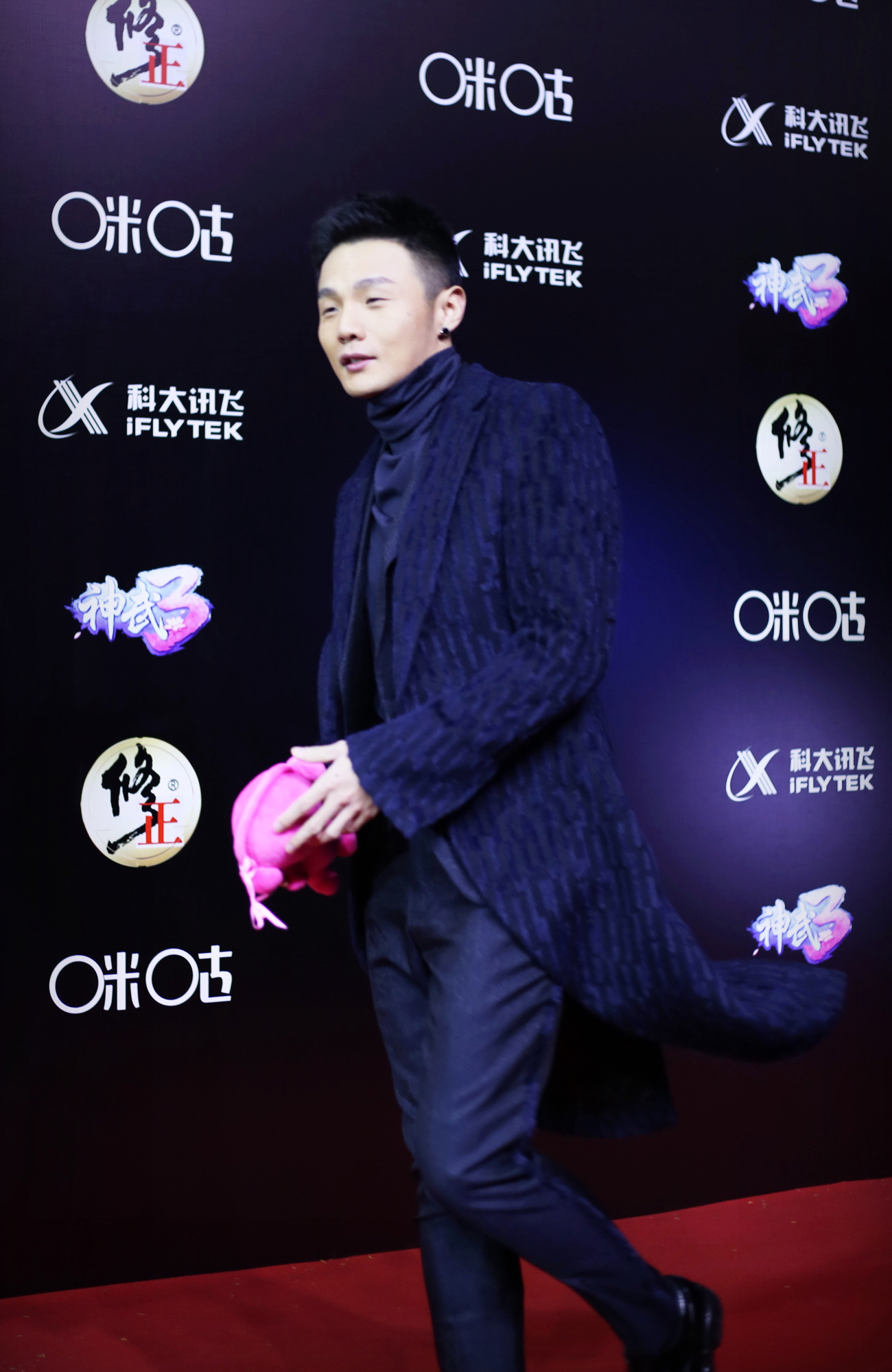 咪咕音乐盛典